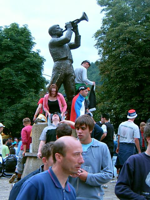 Споменик трубачу, Гуча, 2007